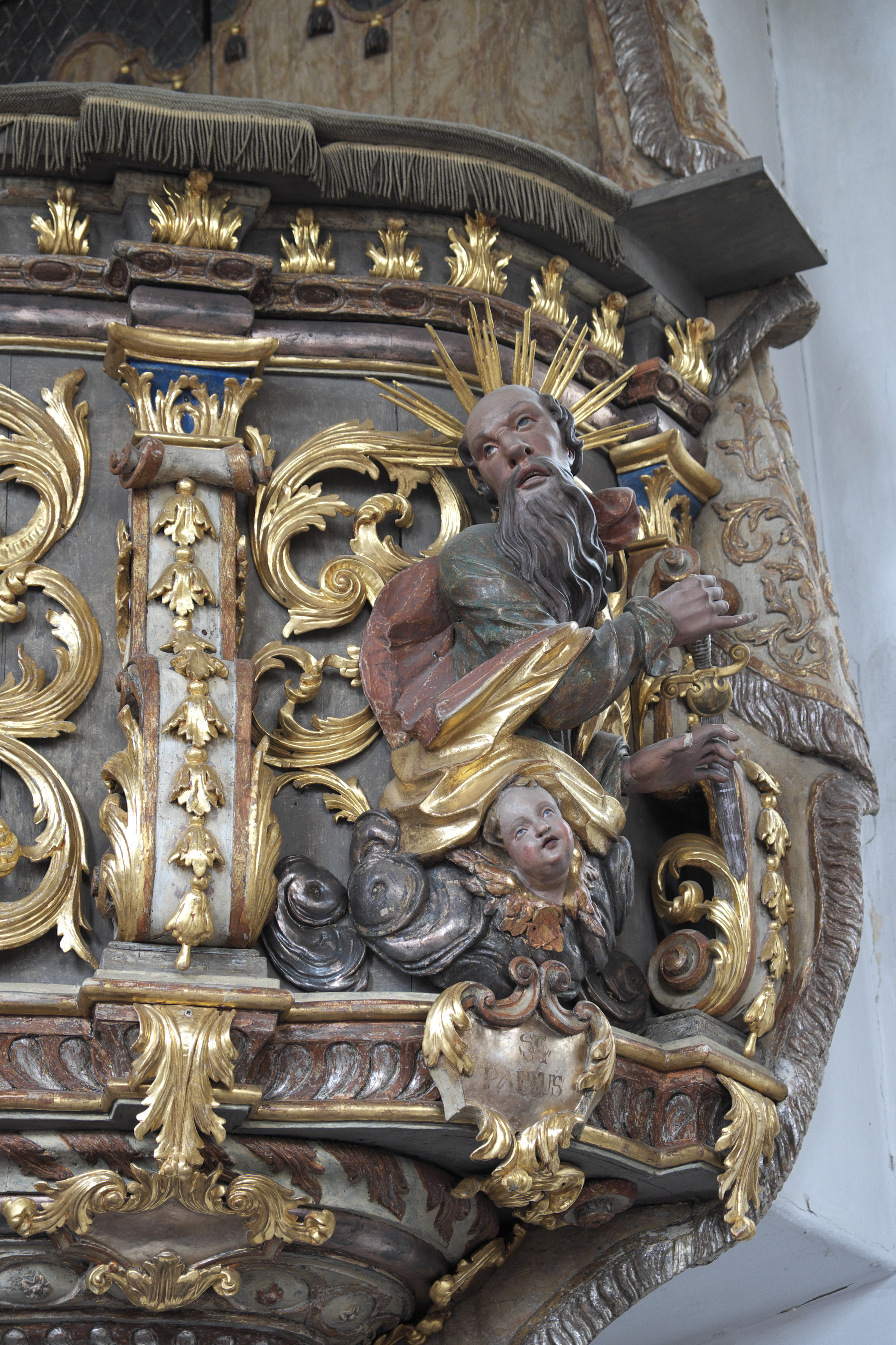 Katholische Pfarrkirche St. Peter und Paul in Oberalting, einem Ortsteil von Seefeld (Bayern/Deutschland), Kanzel von 1723; Apostel Petrus